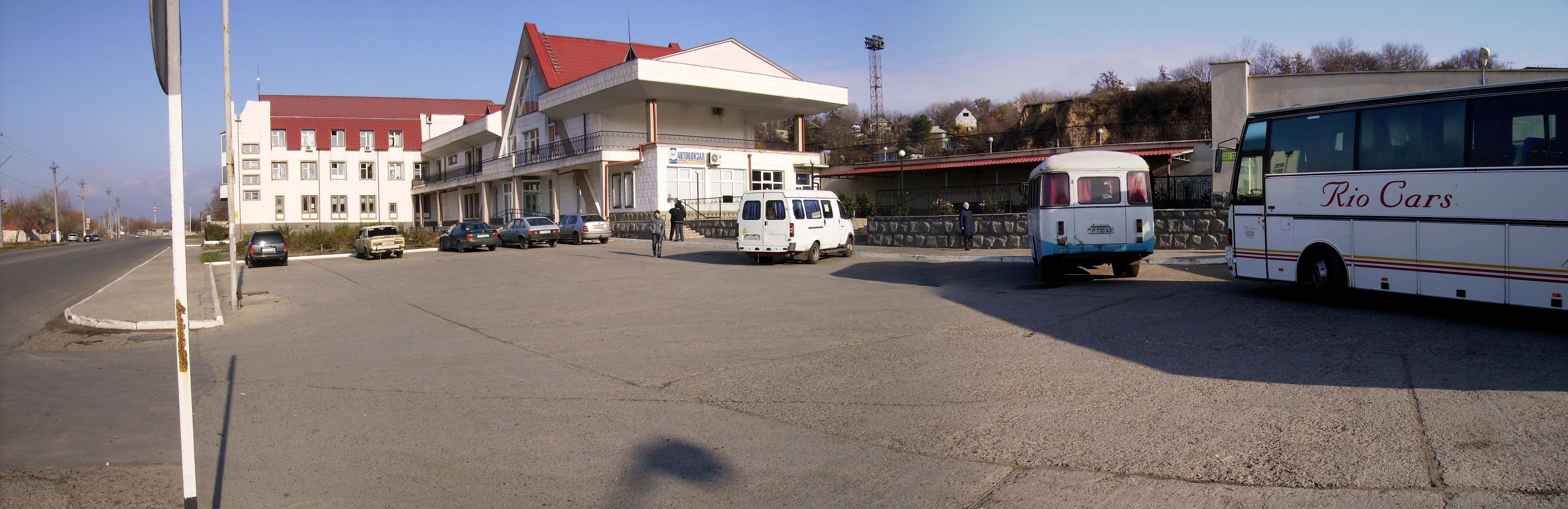 Автостанция в городе Рыбница